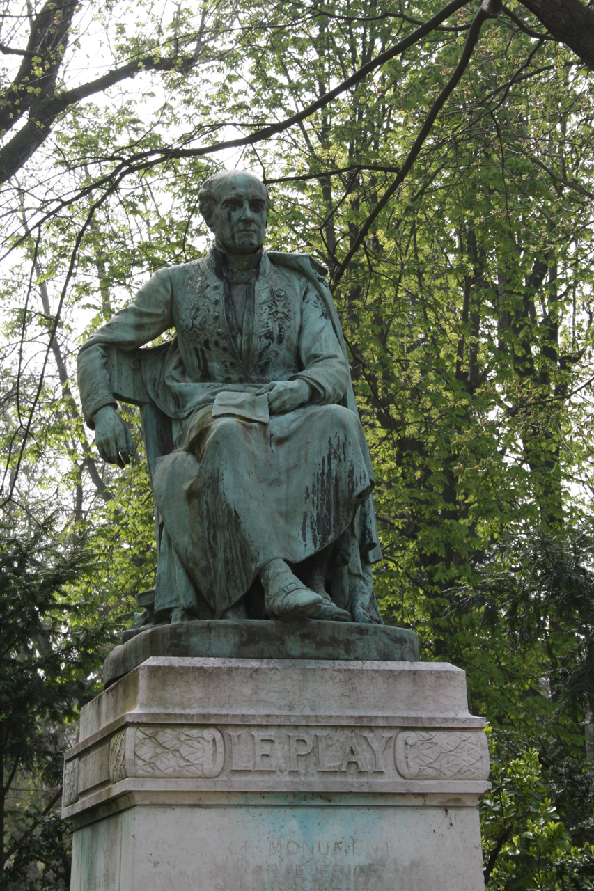 Statue de Pierre Guillaume Frédéric Le Play dans le jardin du Luxembourg